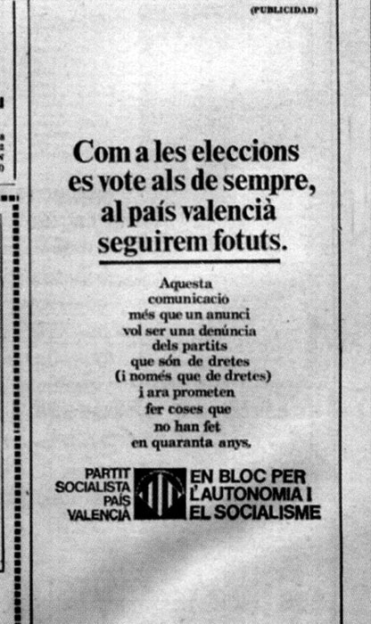 Publicitat del Partit Socialista del País Valencià, anterior a la seua fusió amb el PSOE.